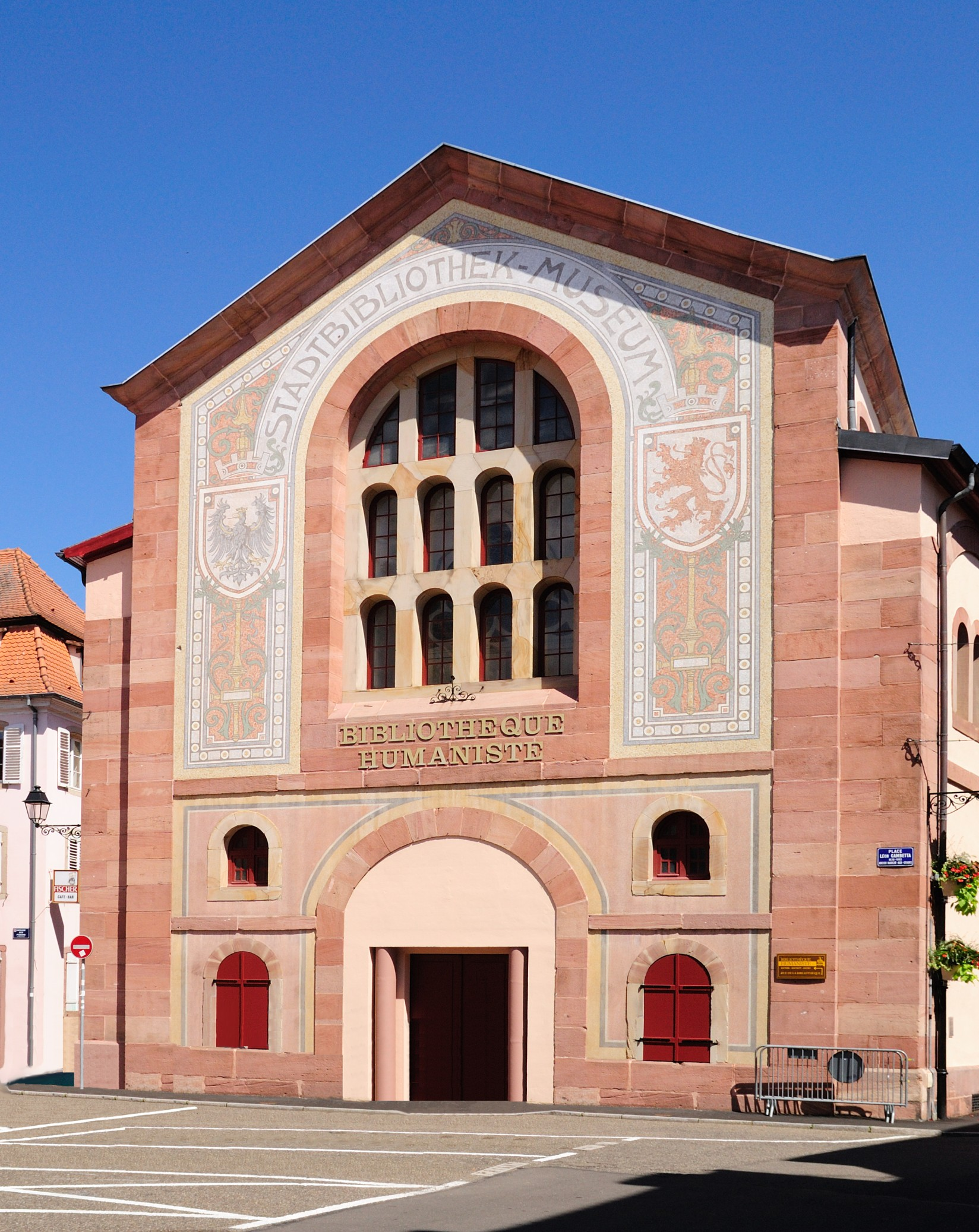 Fassade der Humanistenbibliothek in Schlettstadt